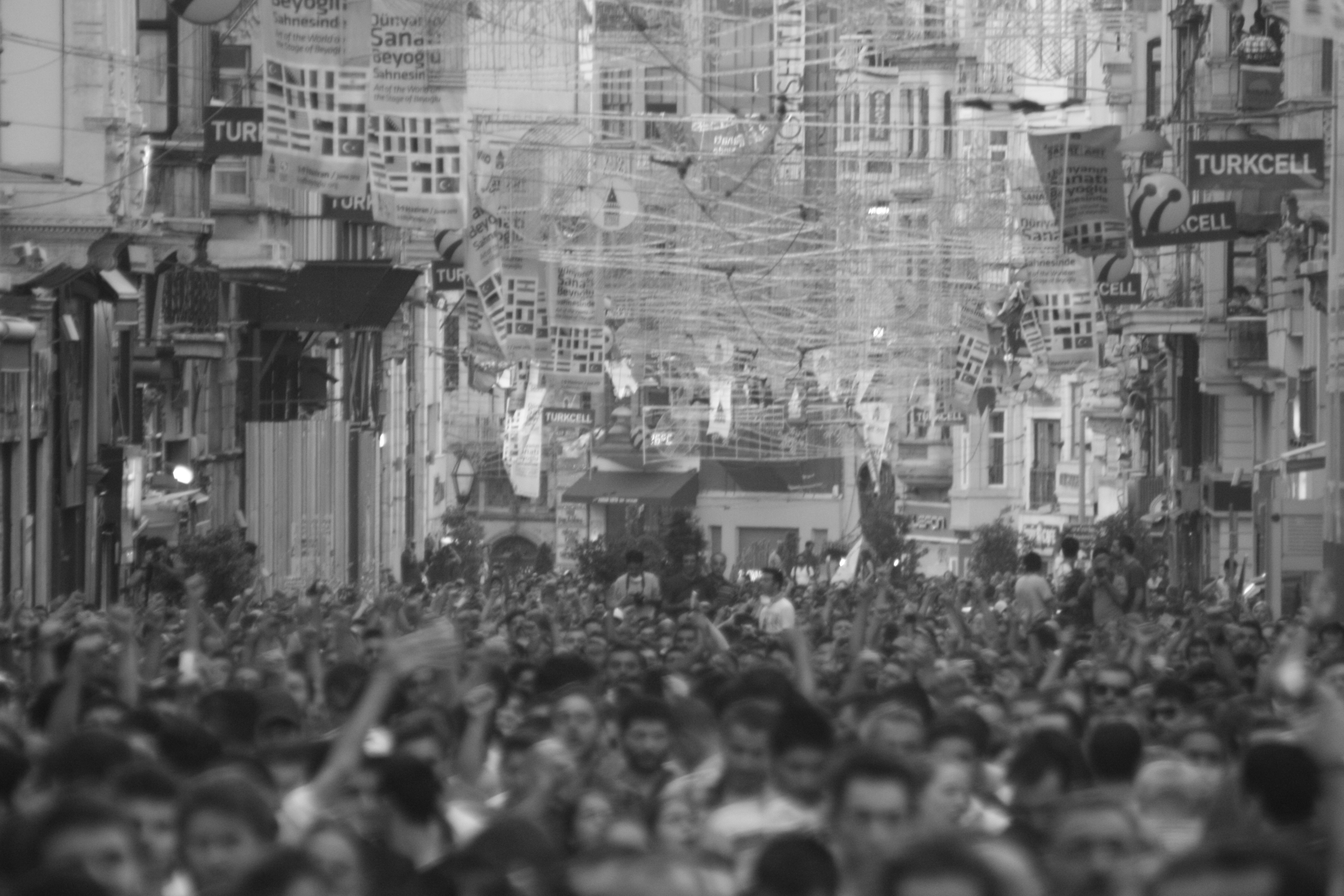 2013 Taksim Gezi Parkı protestoları, İstiklal Caddesi, 31 Mayıs